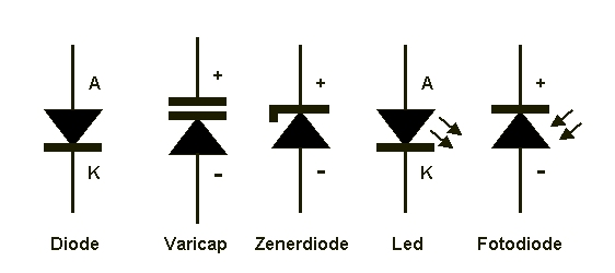 Door de auteur zelf vervaardigde afbeelding.